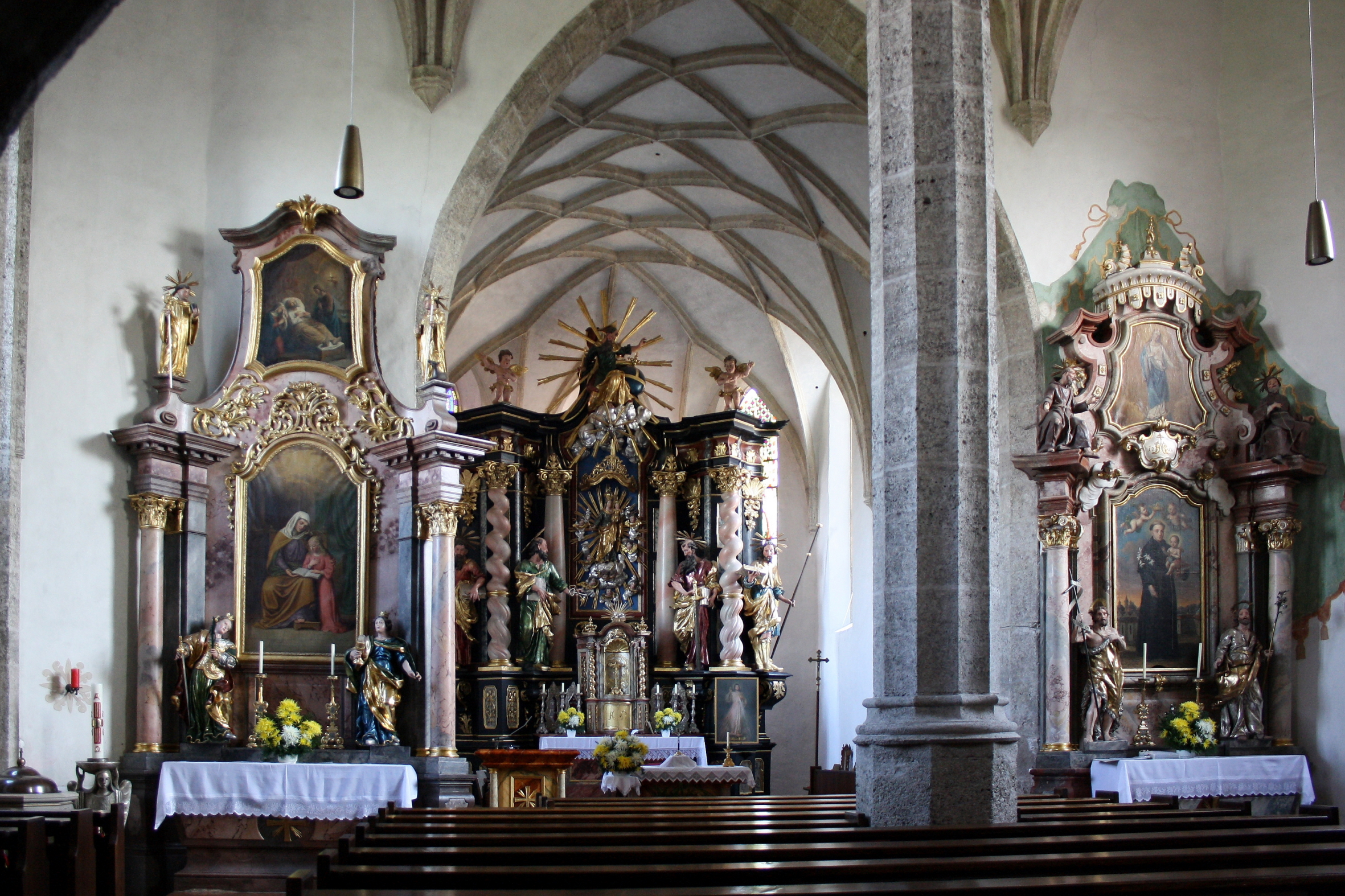 Innenansicht Richtung Altar der Pfarrkirche von Rüstorf.